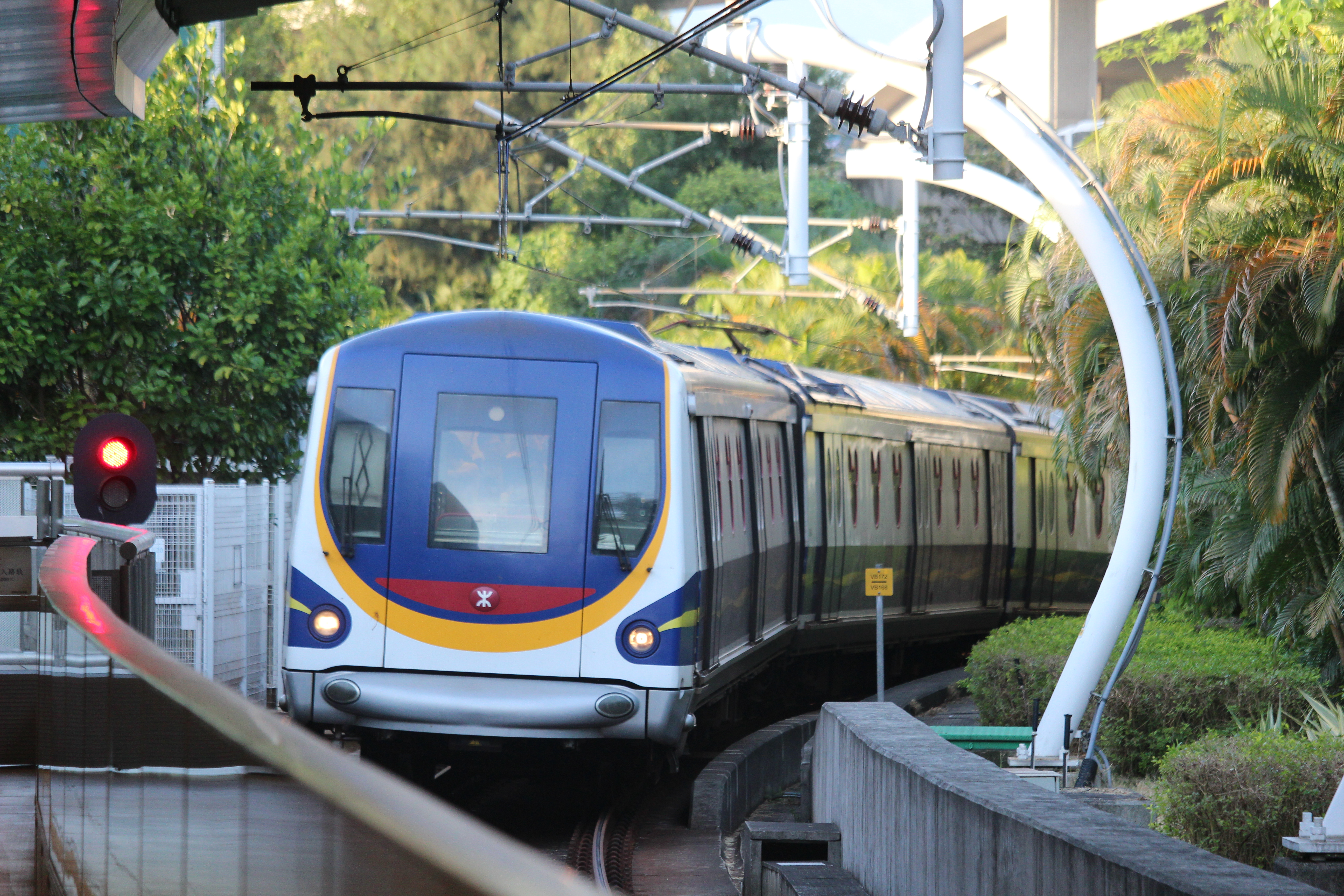 迪士尼綫列車